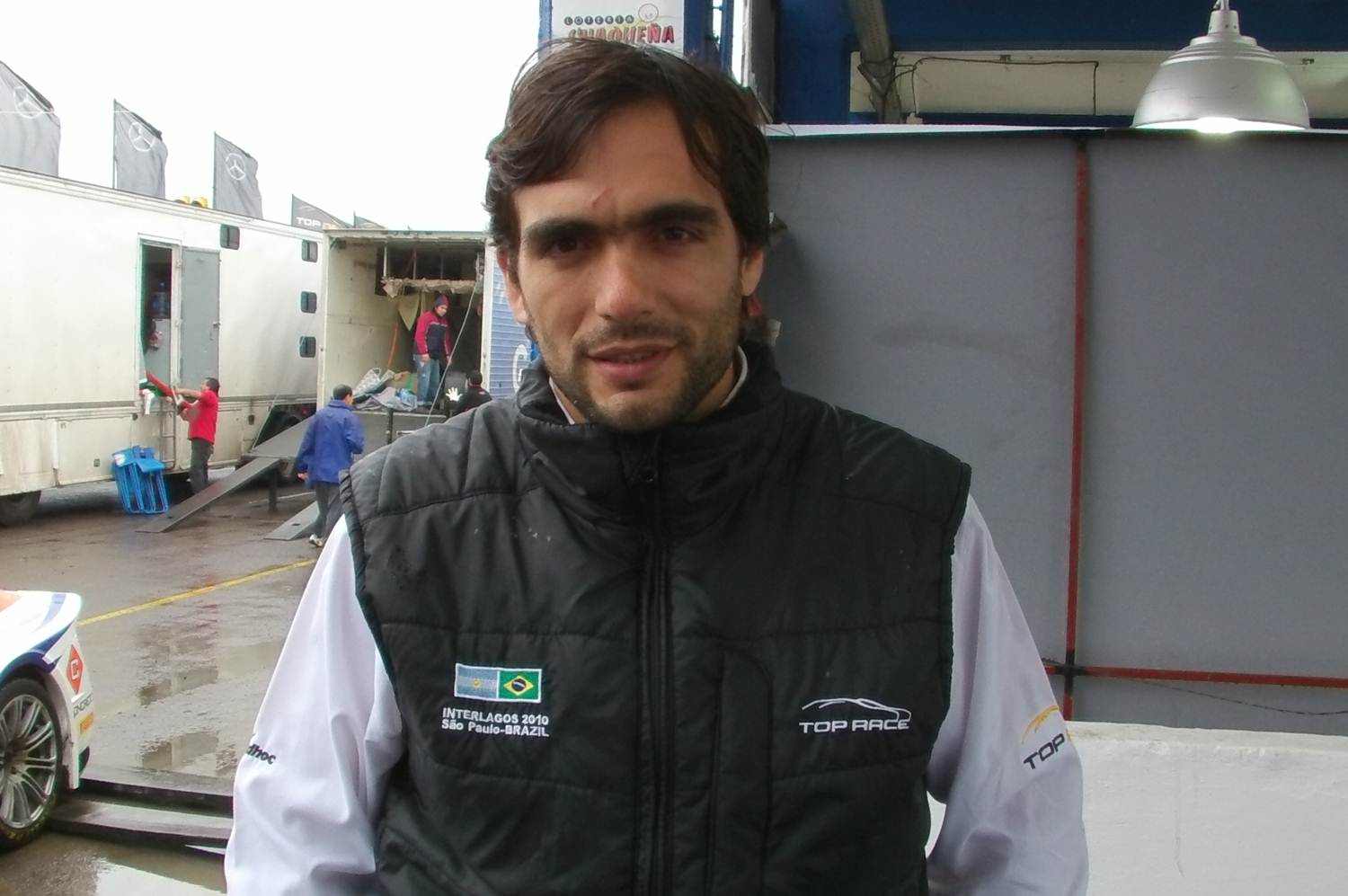 Marcos Vázquez, piloto de Top Race V6